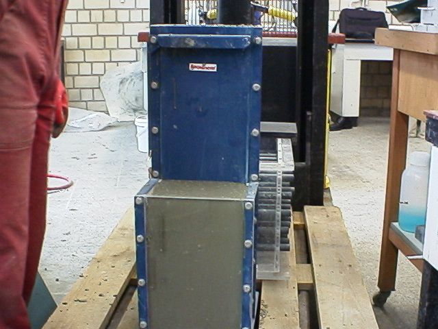 L-Box zur Verarbeitbarkeitsprüfung von SVB